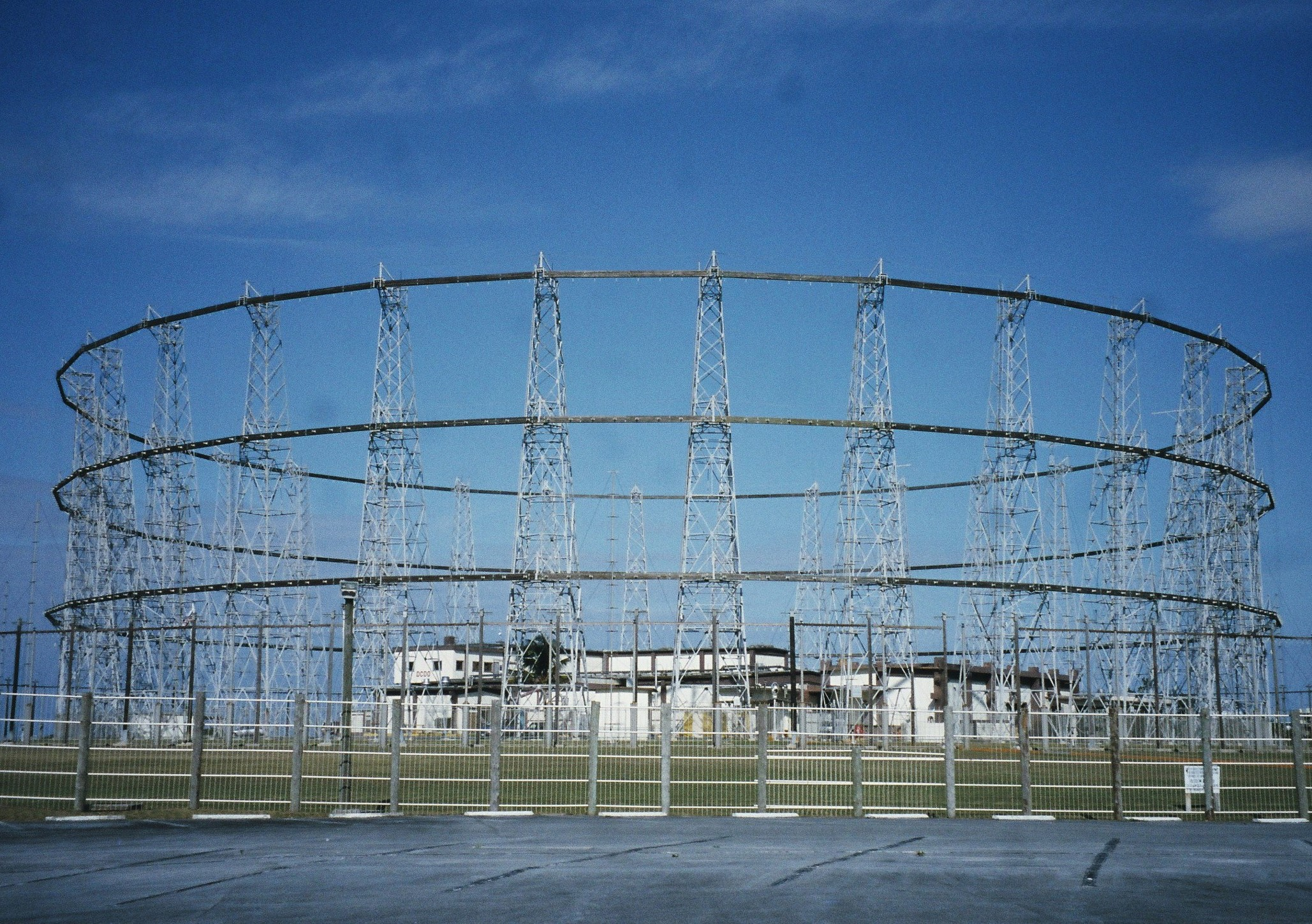 楚辺通信所全景（2004年1月撮影）